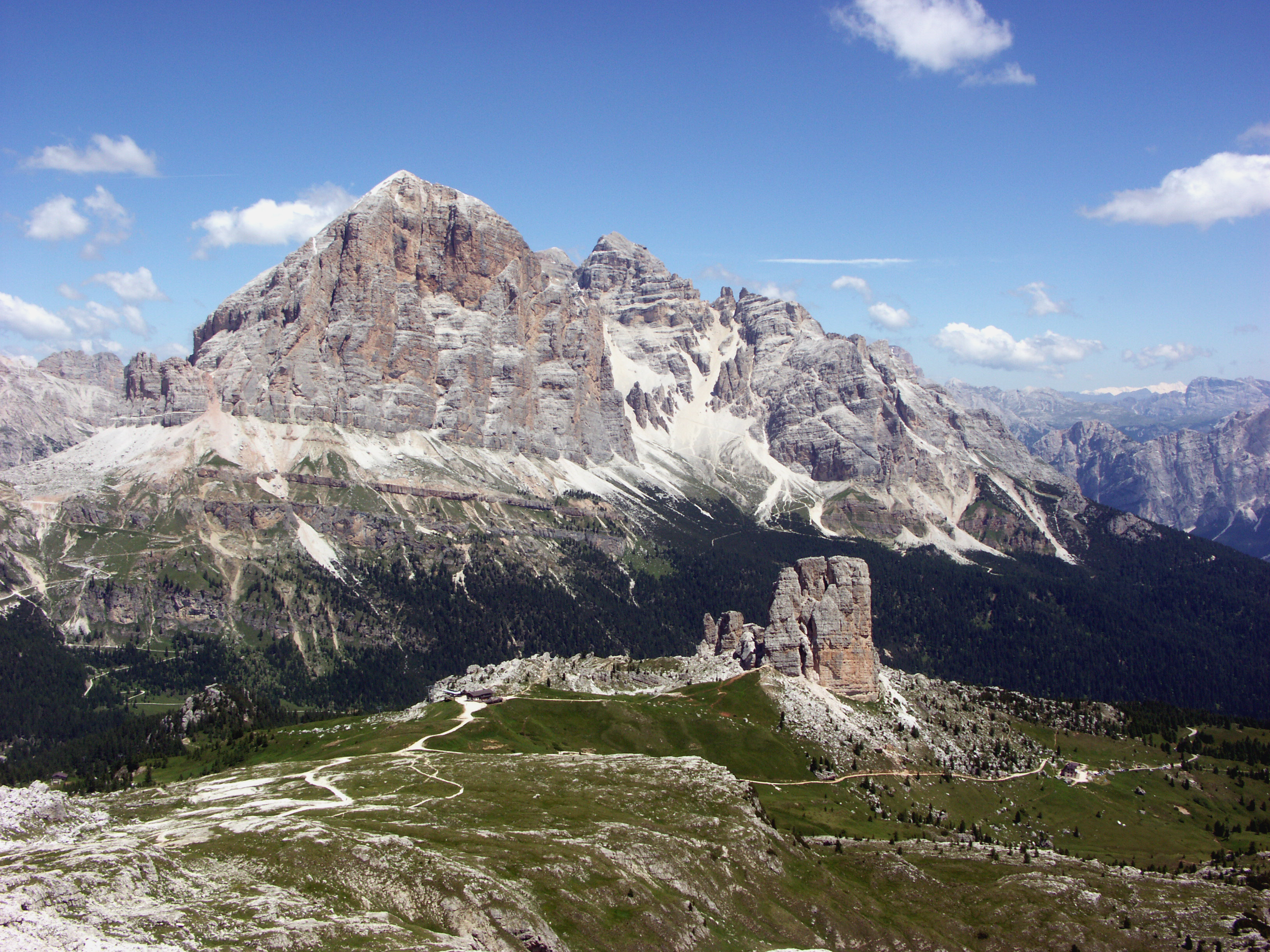 Italien, Dolomiten, Tofana-Massiv mit Cinque Torri im Vordergrund